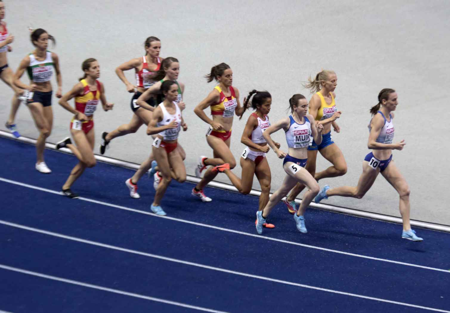 EKB52966 1500m dames finale